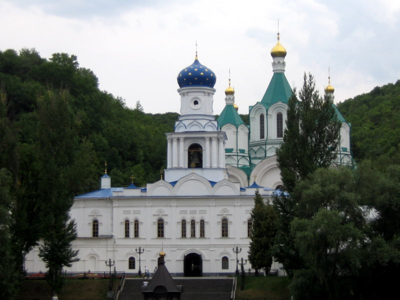 Svyatogirs'kaya Lavra 23.jpg